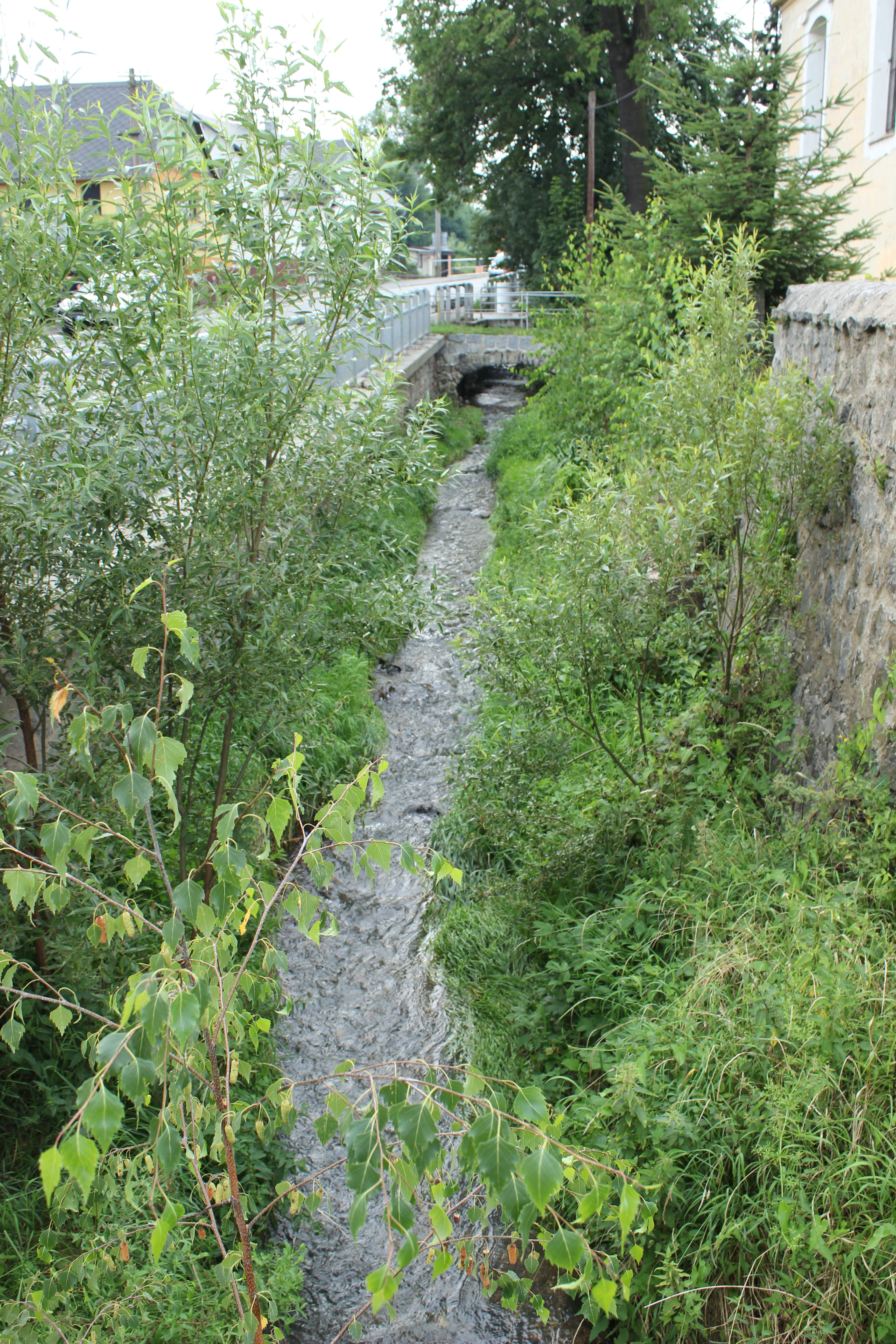 Větrovský potok podél frýdlantské Žitavské ulice.